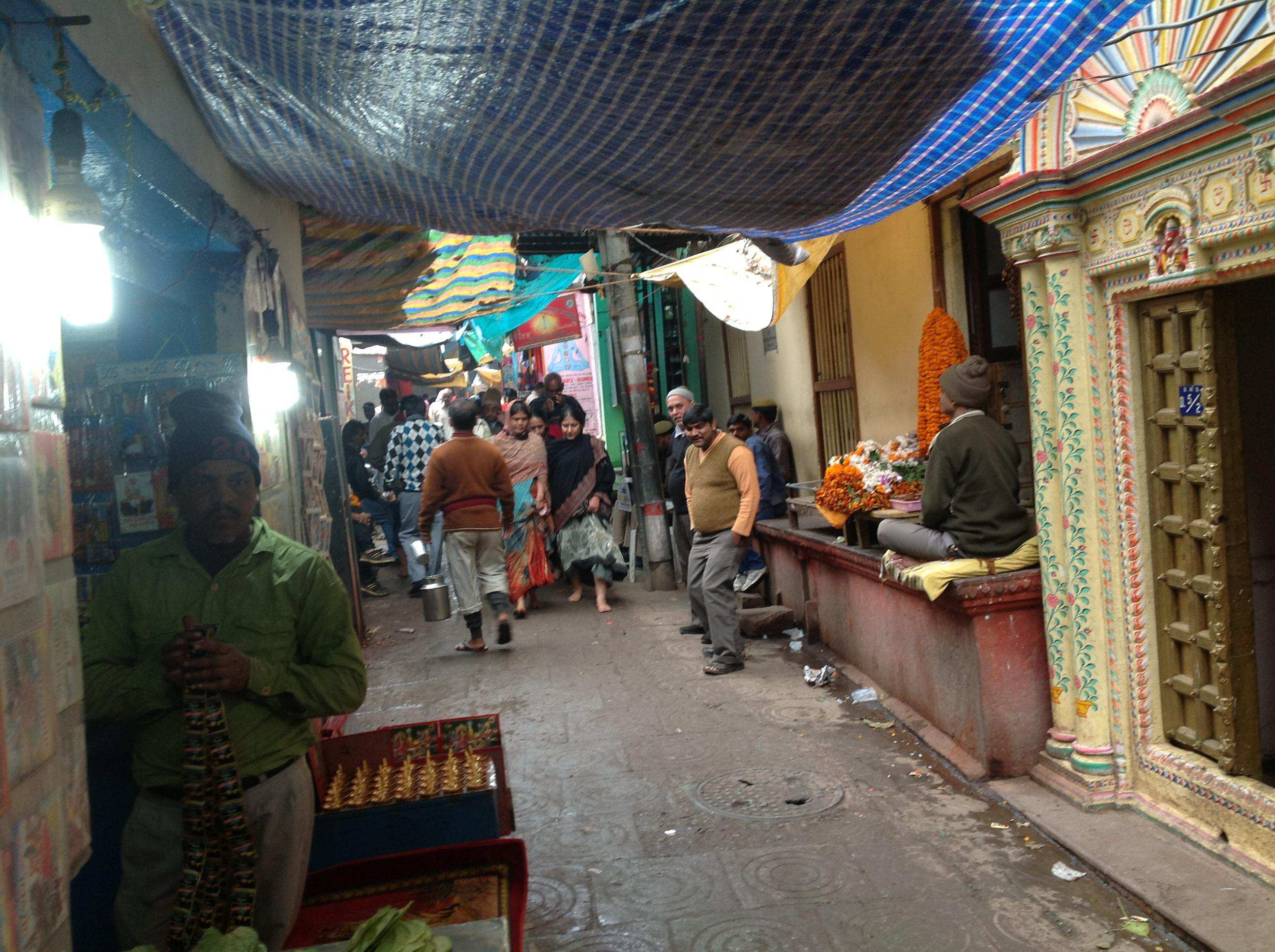 Древние улицы старого города кишат торговлей.